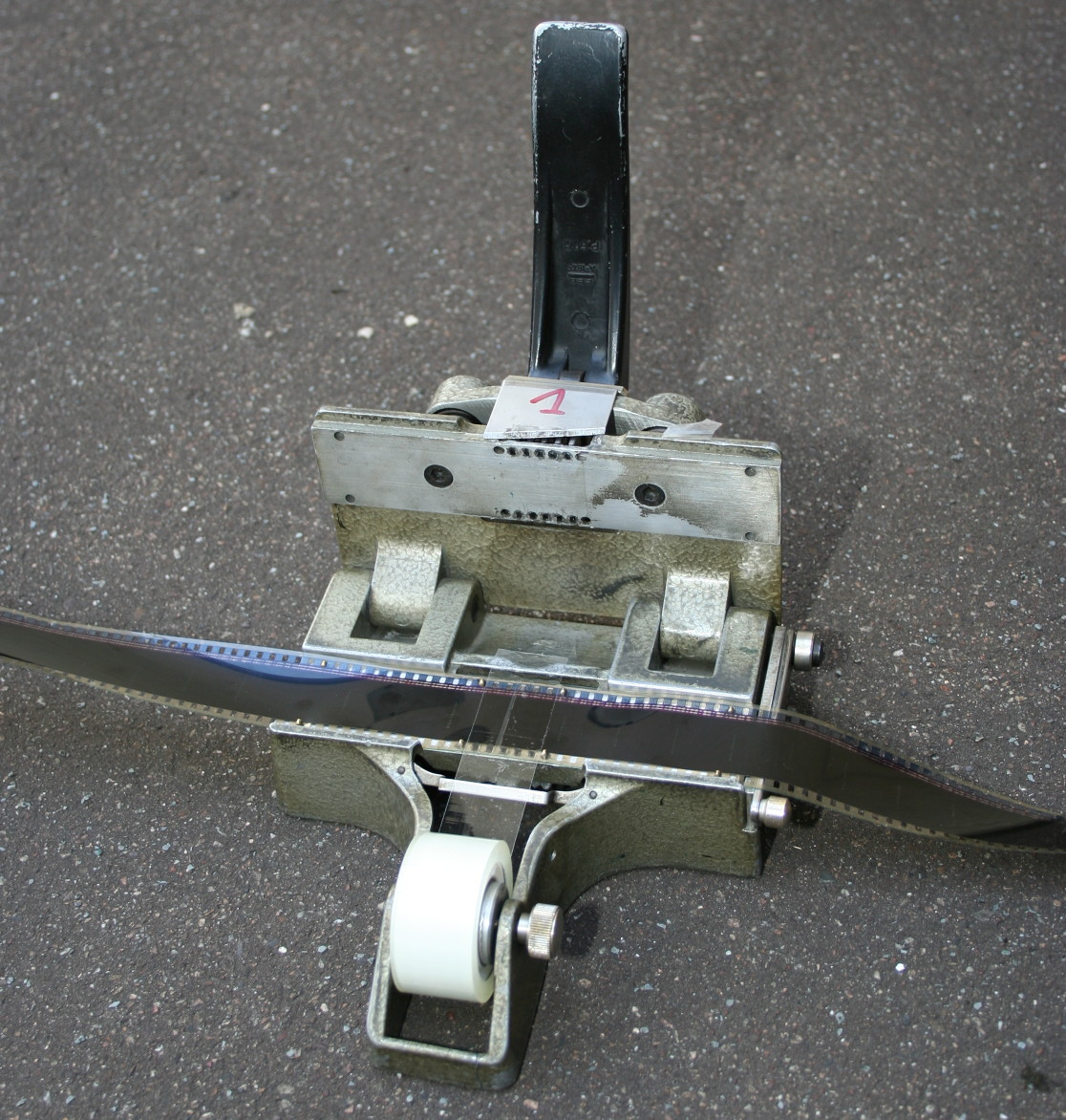 Klebepresse